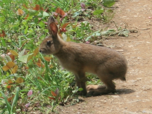 ニホンノウサギ 伊吹山にて